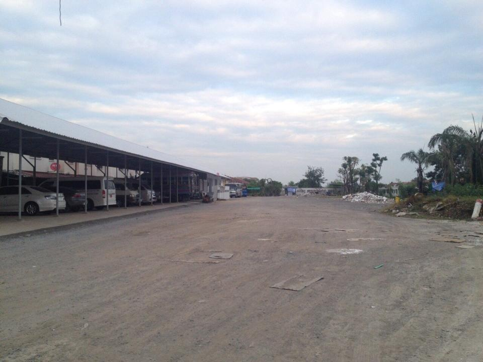 ลานจอดรถบัสรับ-ส่งนักเรียน โรงเรียนสวนกุหลาบวิทยาลัย รังสิต